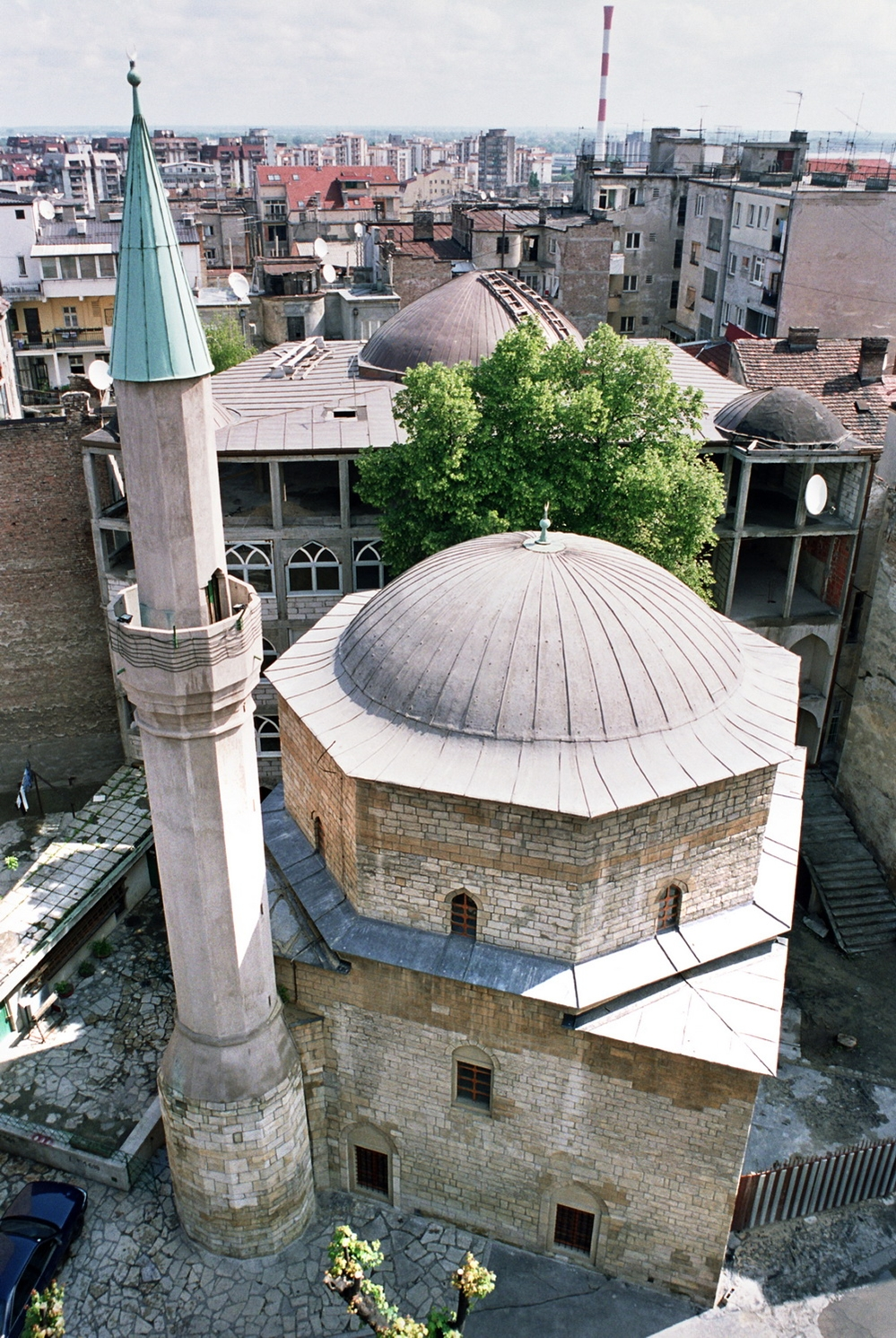 Autor by Snežana Negovanović